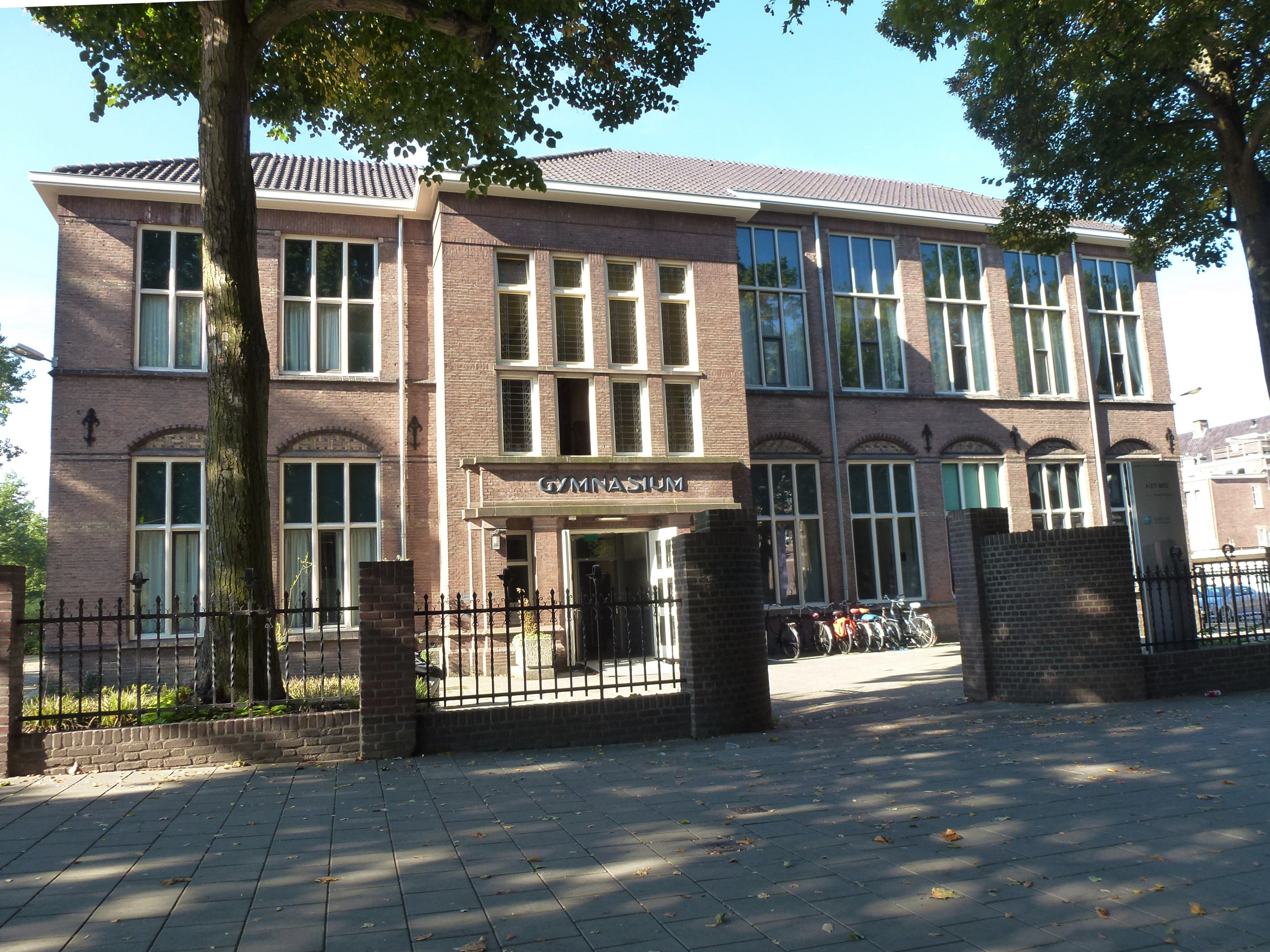 Nijmegen Van Schevichavenstraat 12 Gymnasium